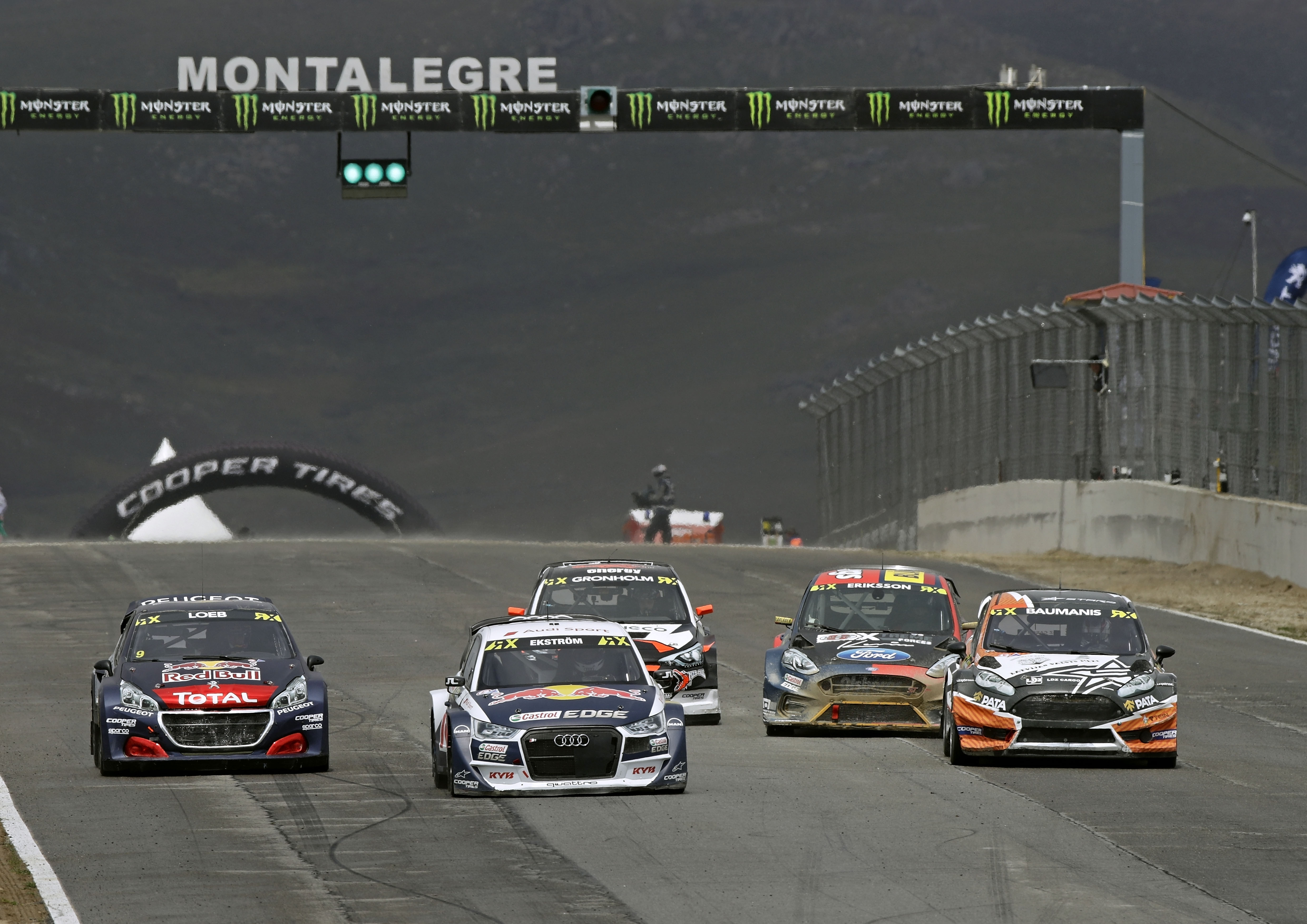 Audi S1 EKS RX quattro #5 (EKS Audi Sport), Mattias Ekström